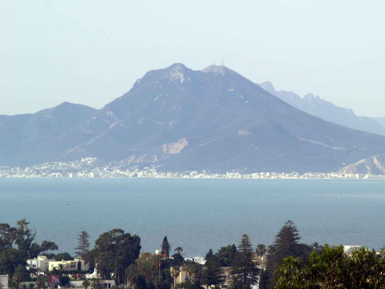 Le Bou Kornine vu de la colline de Carthage Bertrand Bouret